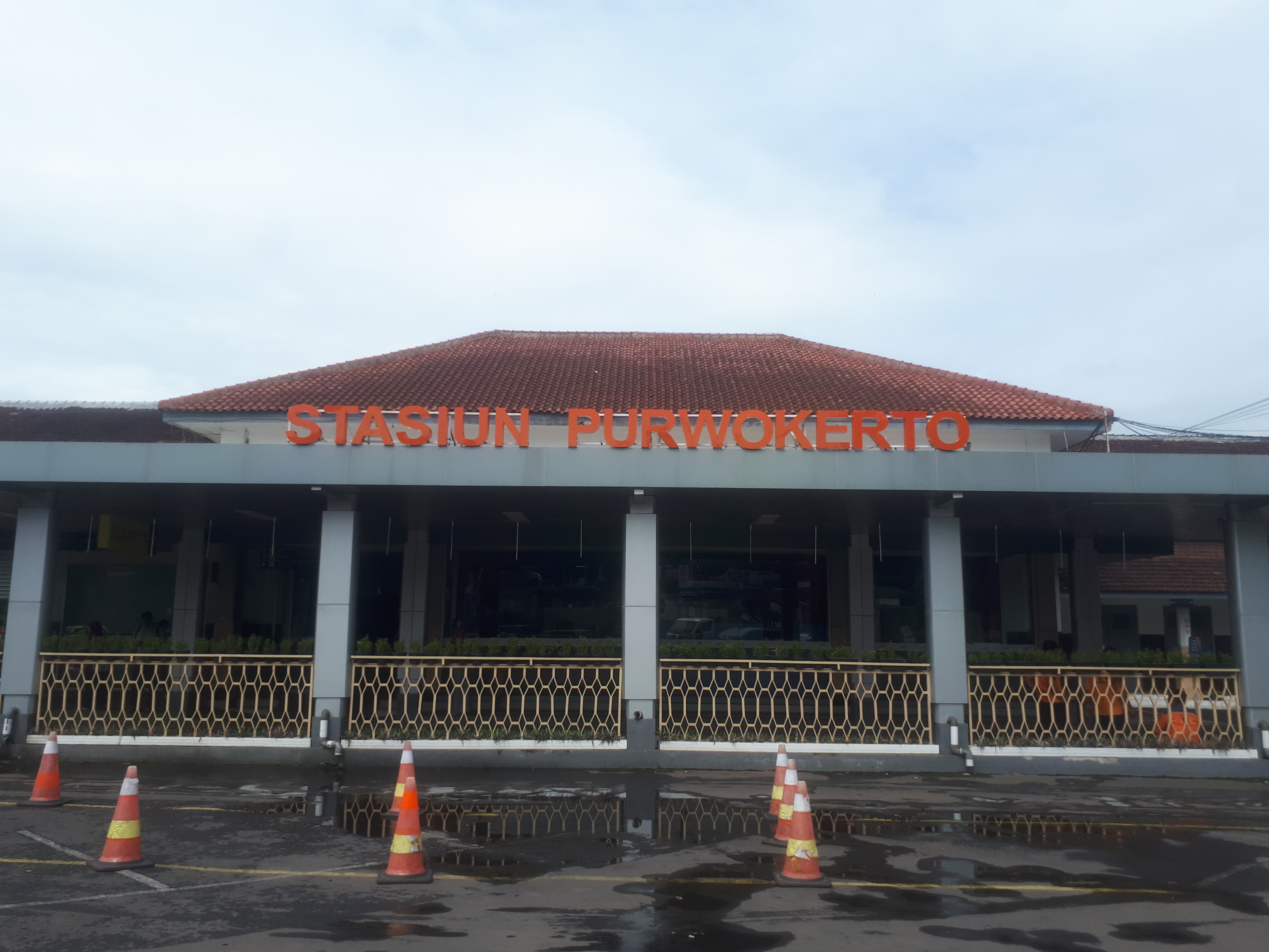 Tampak depan Stasiun Purwokerto tahun 2020